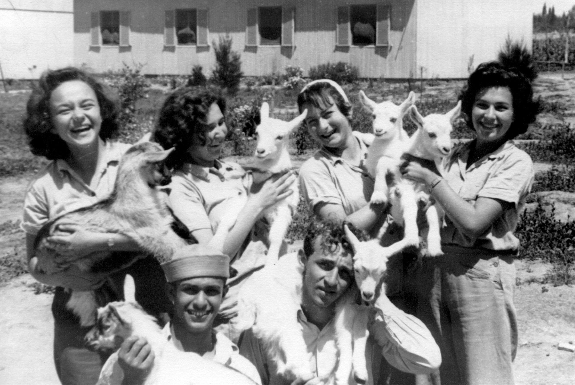 בנות ובני קבוצת שבלים עם גדיים ממשק מוסד.